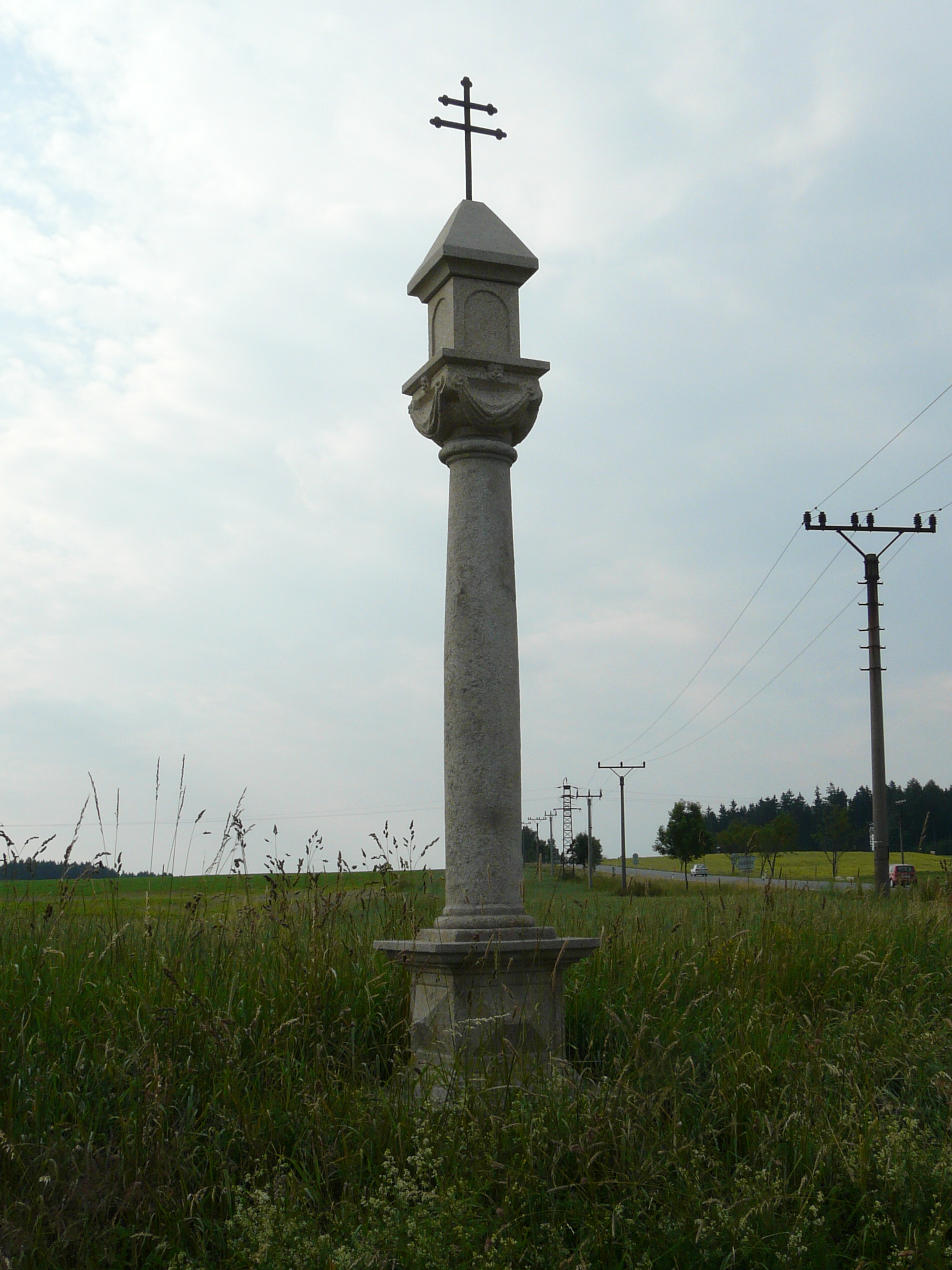 Boží muka (Polnička), u křižovatky, Polnička